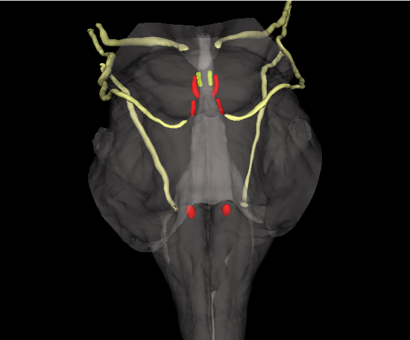 Anatorama irudia